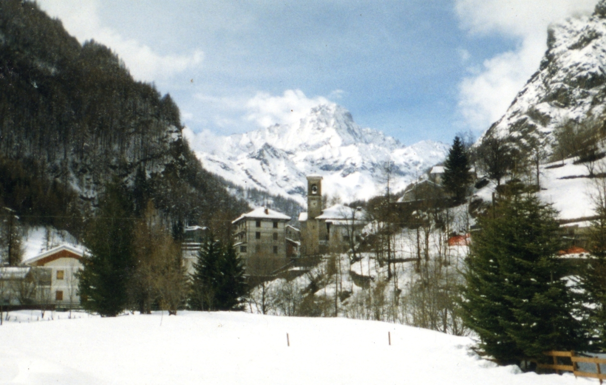 Balme (Valli di Lanzo, TO), sullo sfondo la Bessanese.